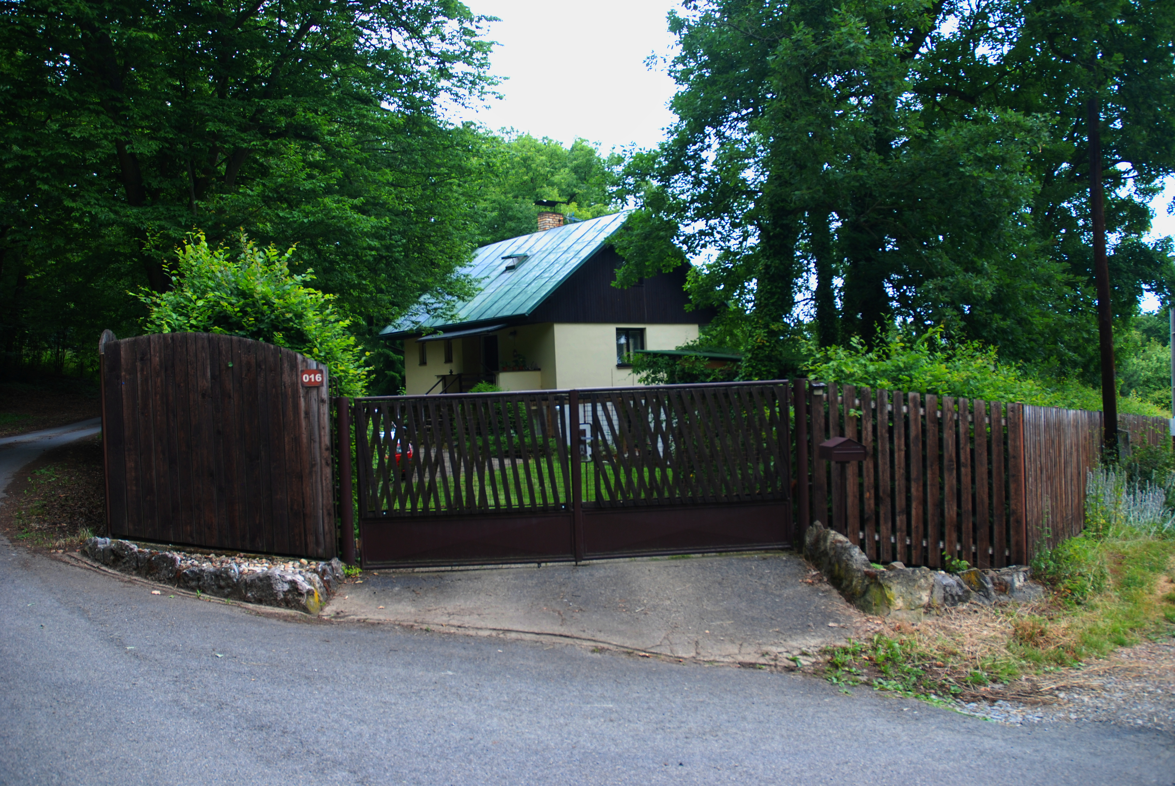 Osada Záhrabská